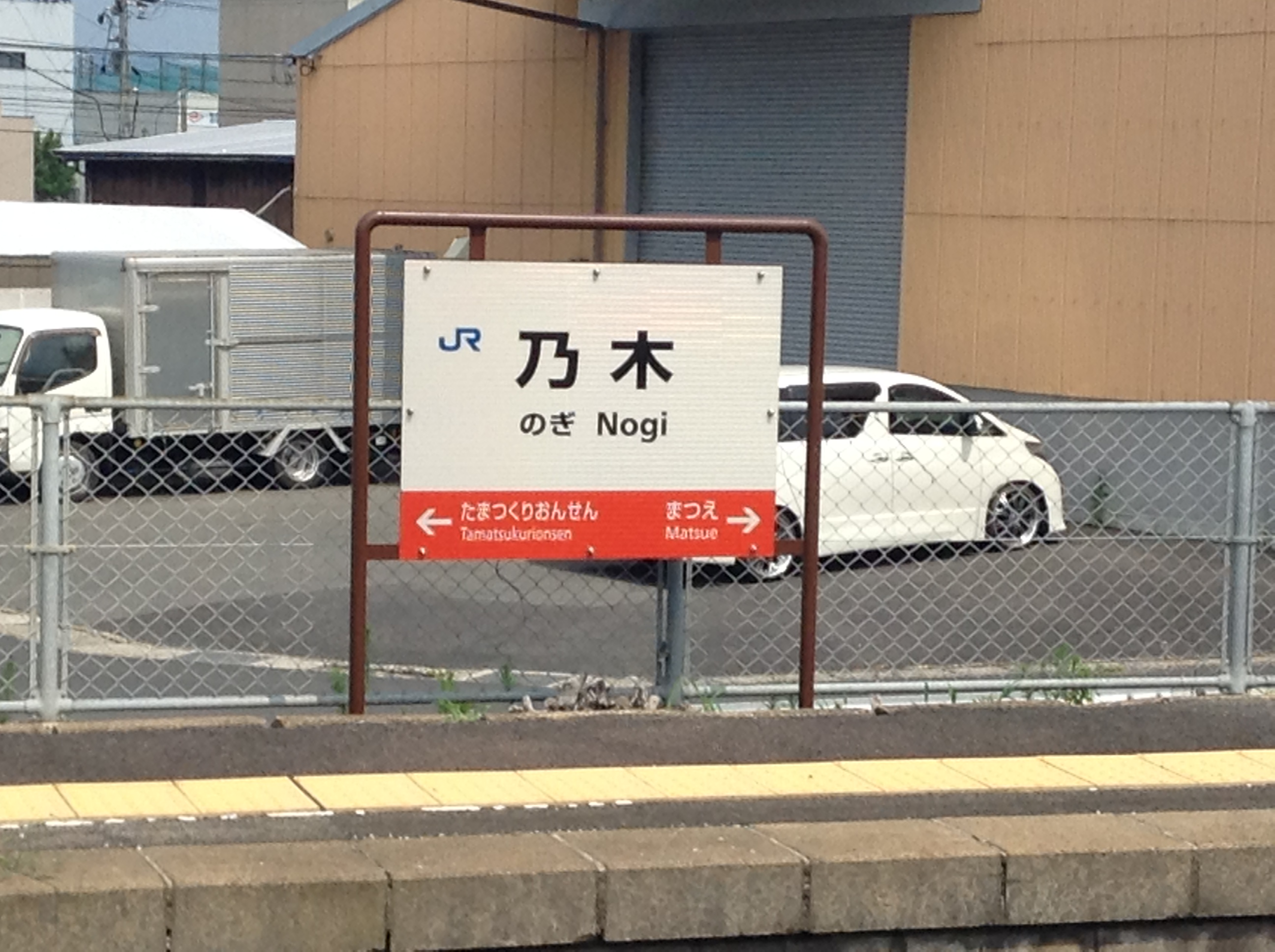 乃木駅名標